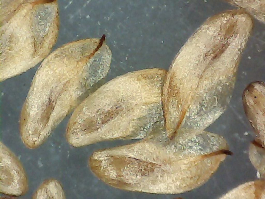 Casuarina cunninghamiana - Semillas sueltas (muy aumentadas). - Parque de la Huerta (ornamental/cultivado), Albatera (Provincia de Alicante, España).